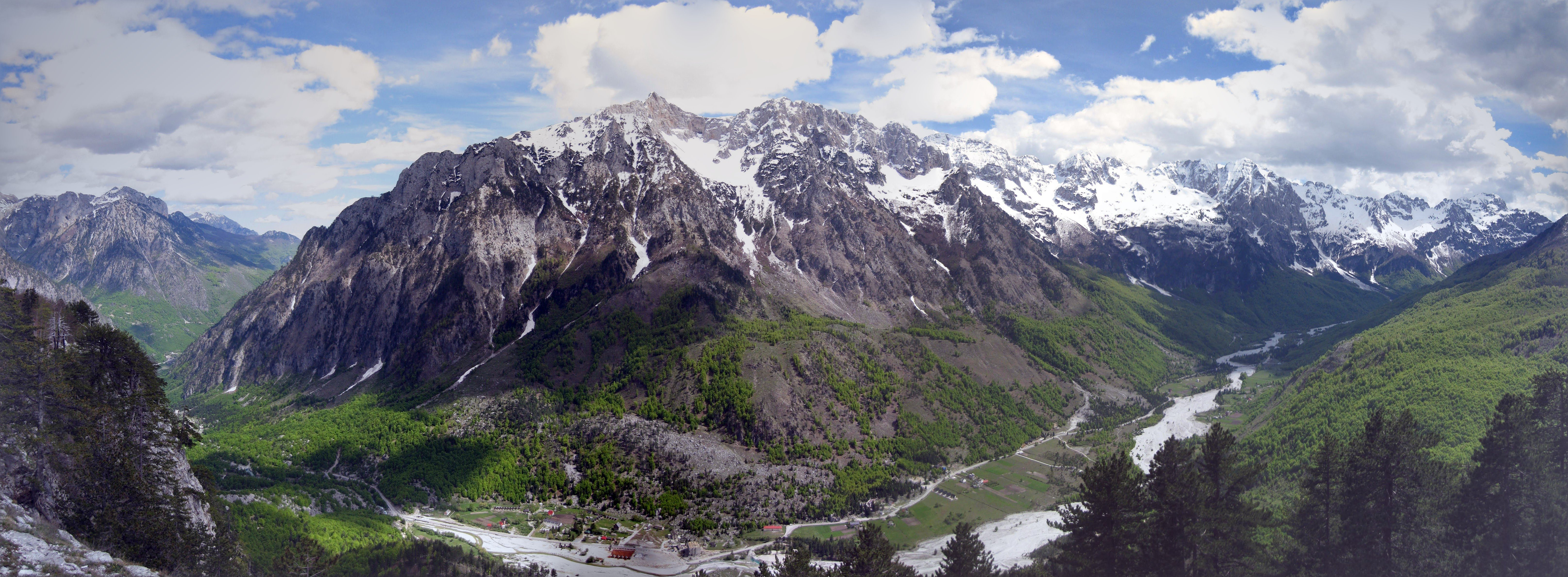 Lugina e Valbones, Tropoje. Panorame nga shtegu bjeshkatar qe kalon nga fshati Kukaj deri ne Selimaj. Lartesia mbidetare 1400 m